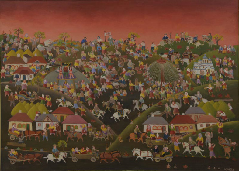 Jevtovic Dušan, Seoska slava, 2009.akrilik-platno, 95 x 130 cm